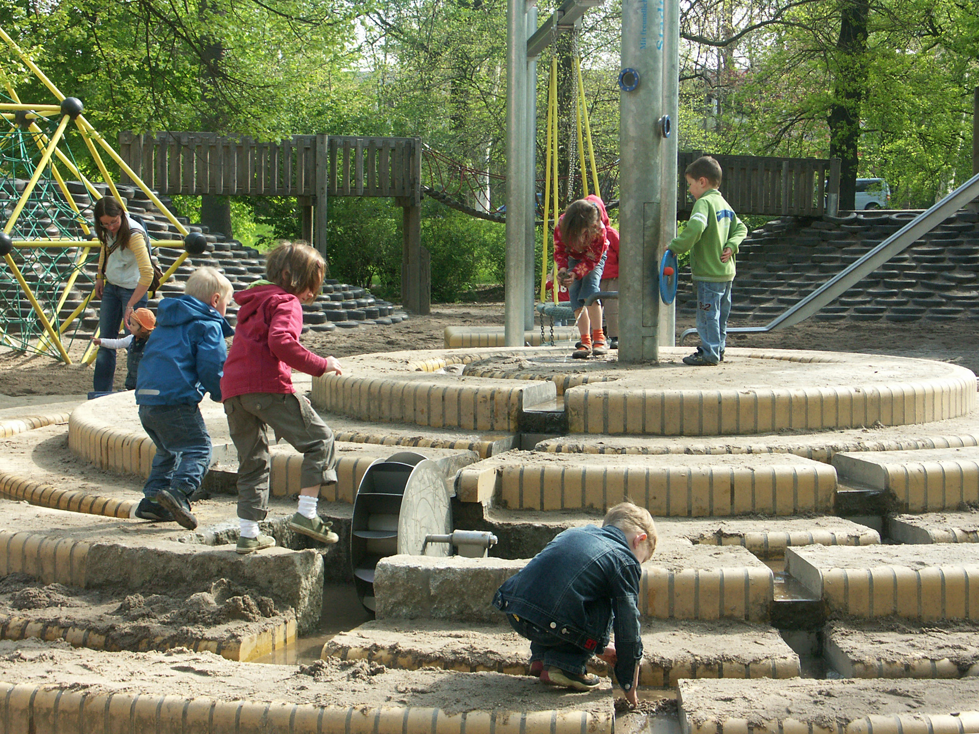 Der Familienspielplatz im Scheibenholzpark in Leipzig